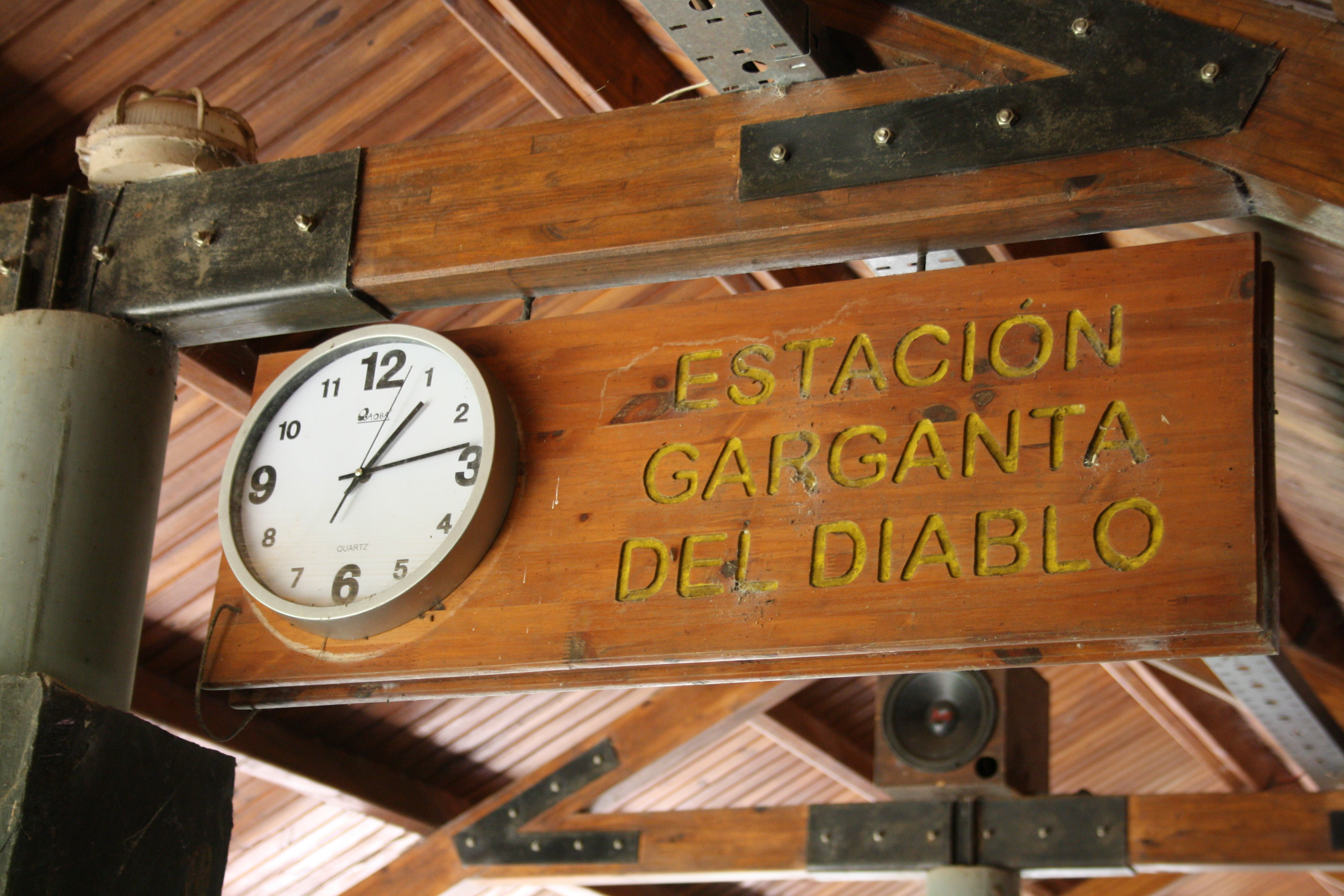 cartel nomenclador de la estación terminal "Garganta del Diablo" del Tren Ecológico de la Selva